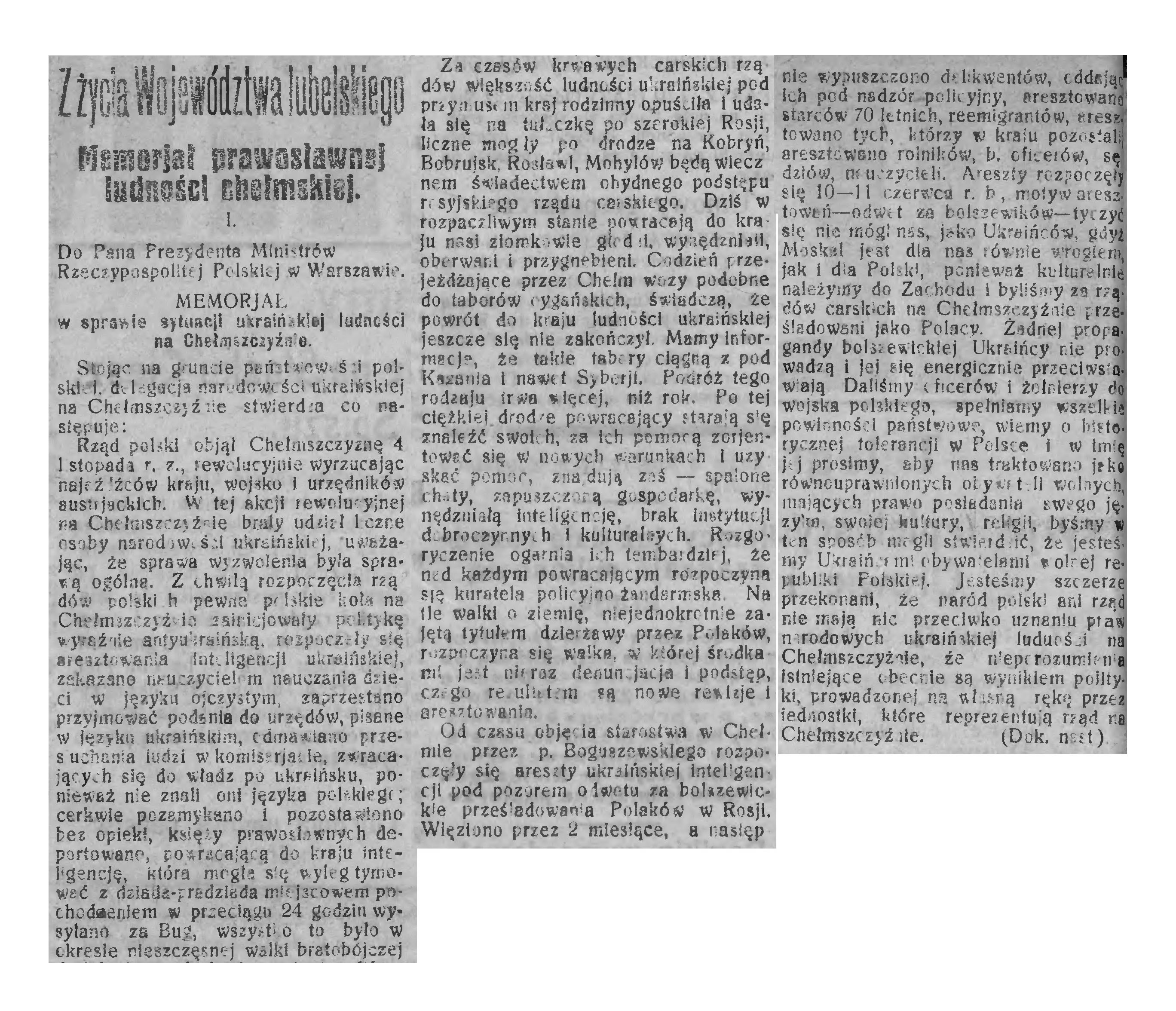 Artykuł przedstawiający treść Memoriału w sprawie sytuacji ukraińskiej ludności na Chełmszczyźnie.